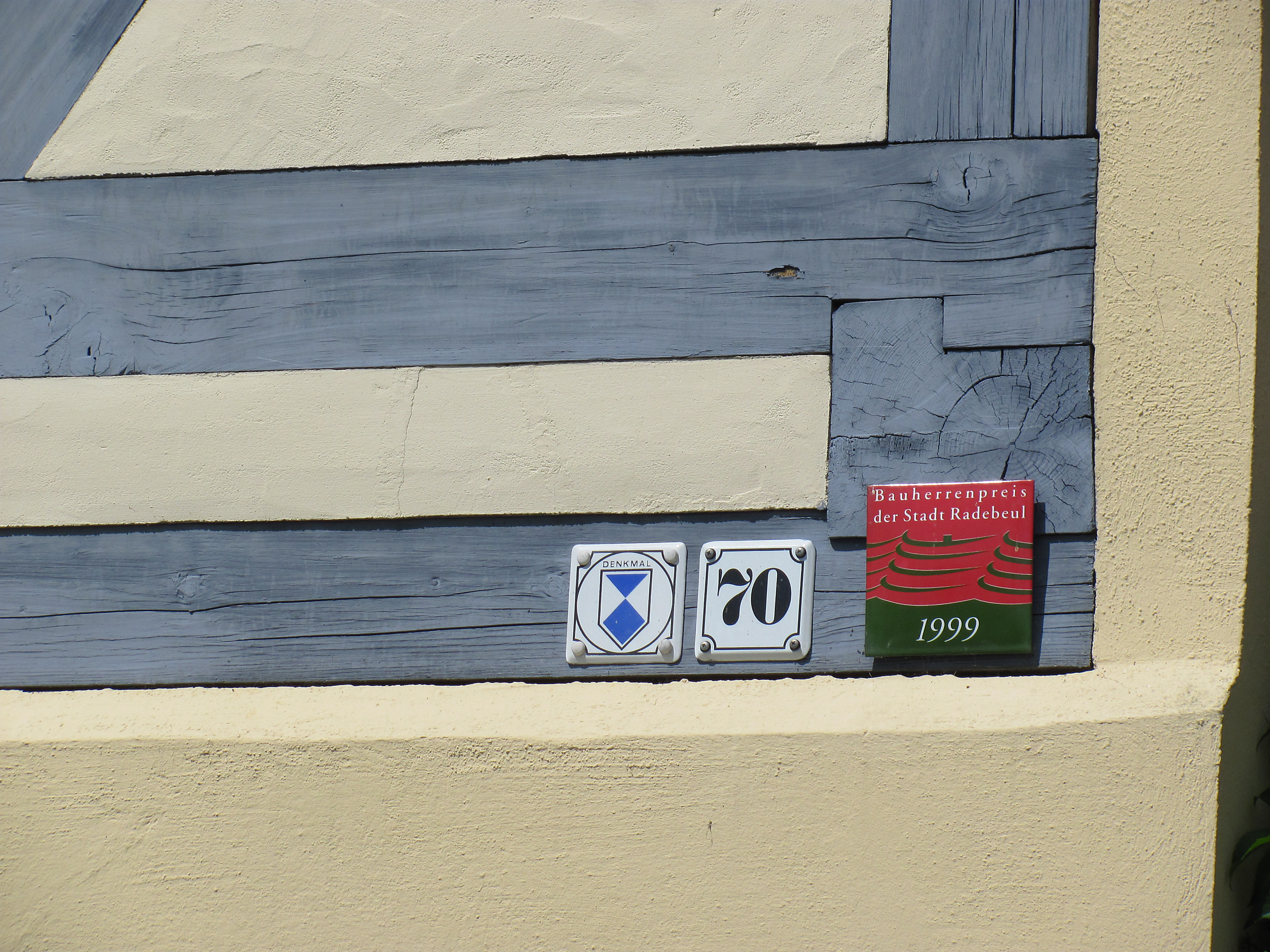 Radebeuler Bauherrenpreis-Plakette an einem Kulturdenkmal